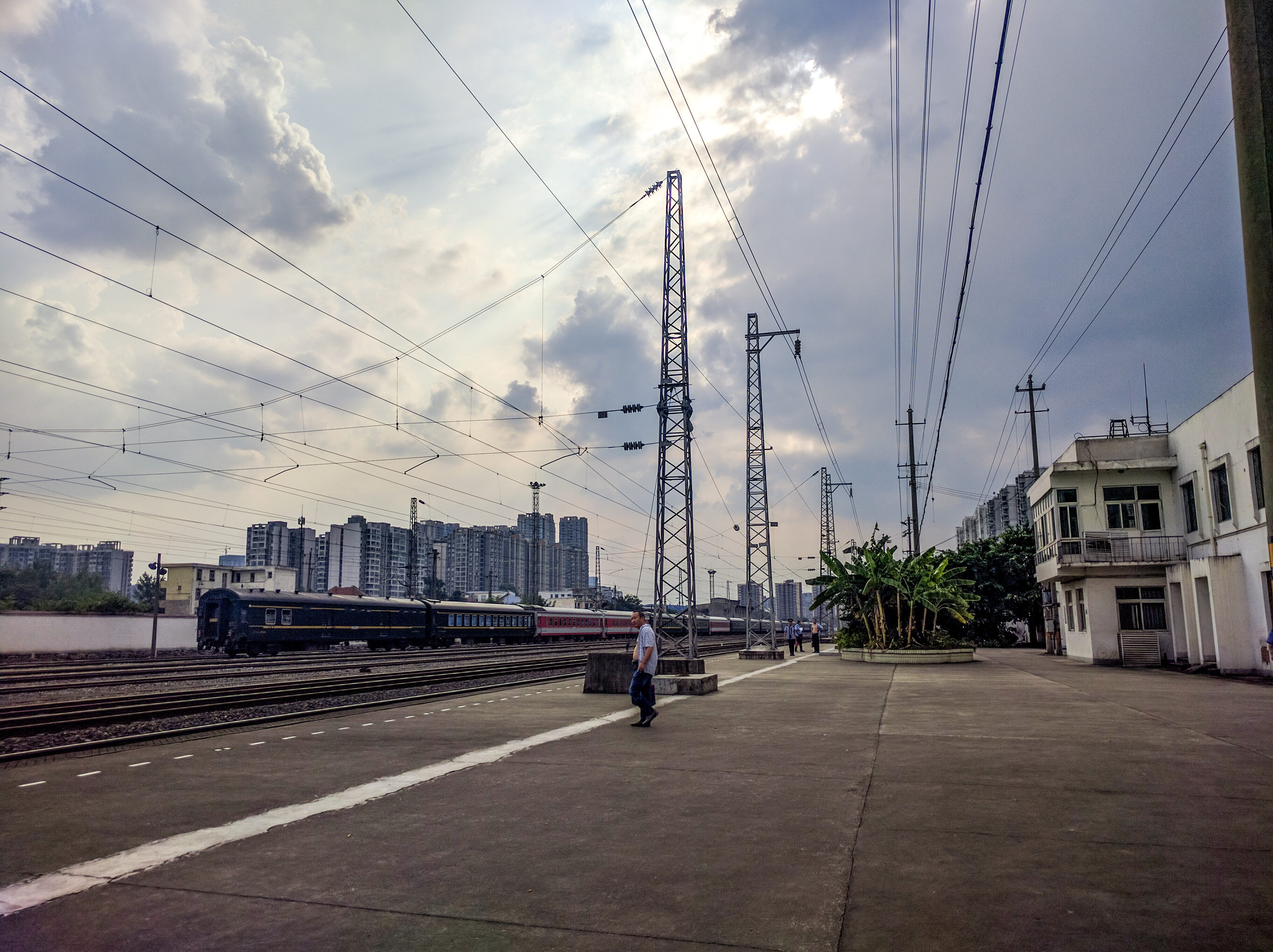 中文（中国大陆）: 八里站，成都